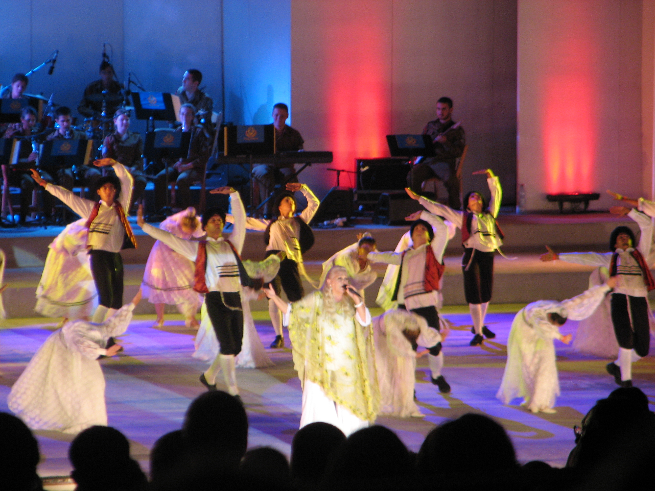 Karmiel Dance Festival, Is an annual dance festival held every summer in the city of Karmiel. The festival was founded in 1987 by two of the greatest authors of folk dance in Israel, Yonatan Carmon and want Hodes. July 2011 Festival פסטיבל מחול כרמיאל הוא פסטיבל מחול שנתי המתקיים בעיר כרמיאל מדי קיץ. הפסטיבל נוסד בשנת 1987 על ידי שניים מגדולי מחברי ריקודי העם בארץ, יונתן כרמון ותרצה הודס. אורכו של פסטיבל המחולות הוא שלושה ימים, ובמהלכו גודשים את העיר המוני אנשים, הצופים במגוון רב של הופעות רקדנים מהארץ ומחו"ל. צילומים מפסטיבל יולי 2011